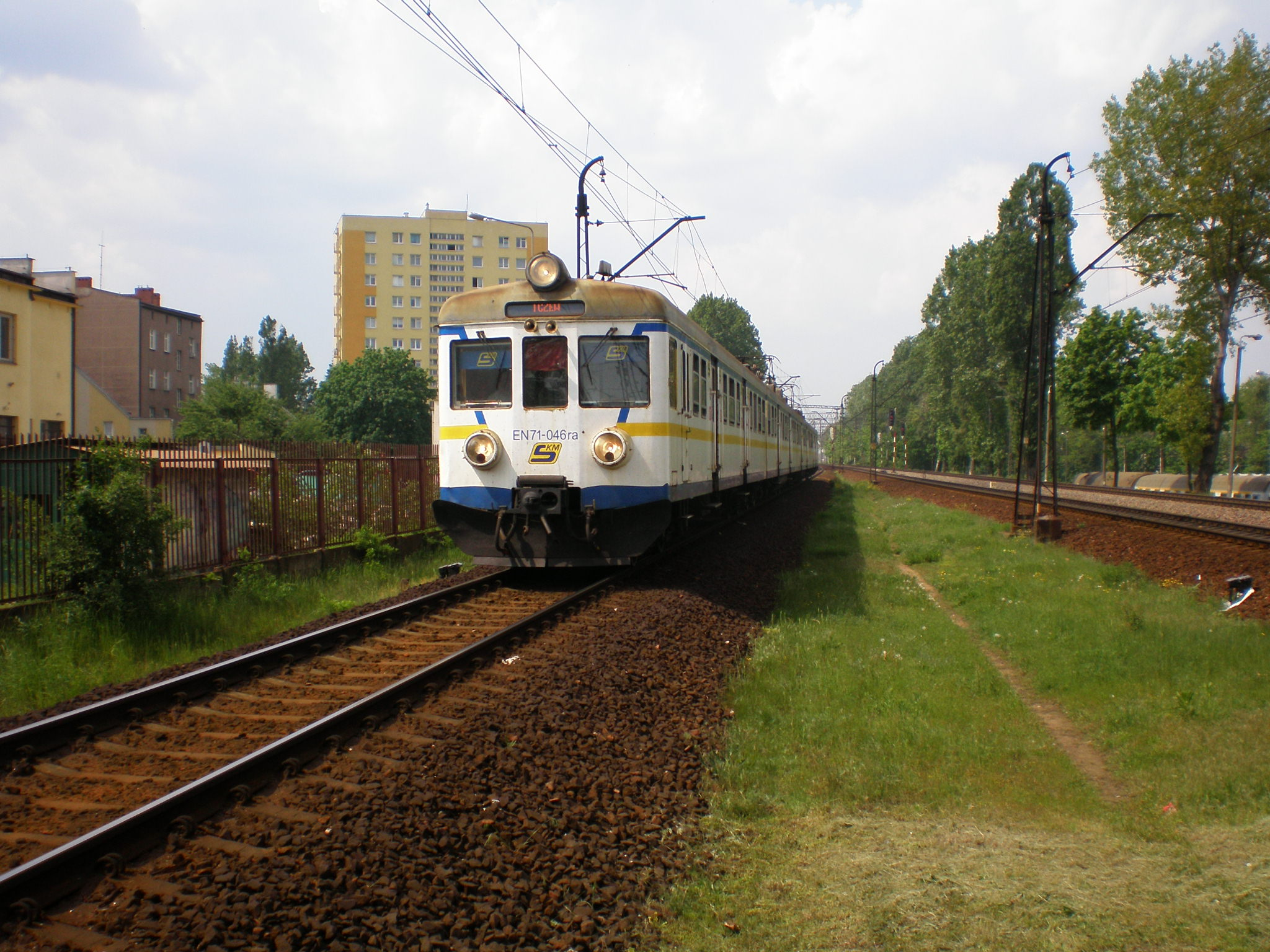 EN71-046 należący do SKM w Trójmieście Sp. z o.o. przyjeżdżający na stację Gdynia Leszczynki, oklejony w dużym stopniu folią w barwach SKM Warszawa